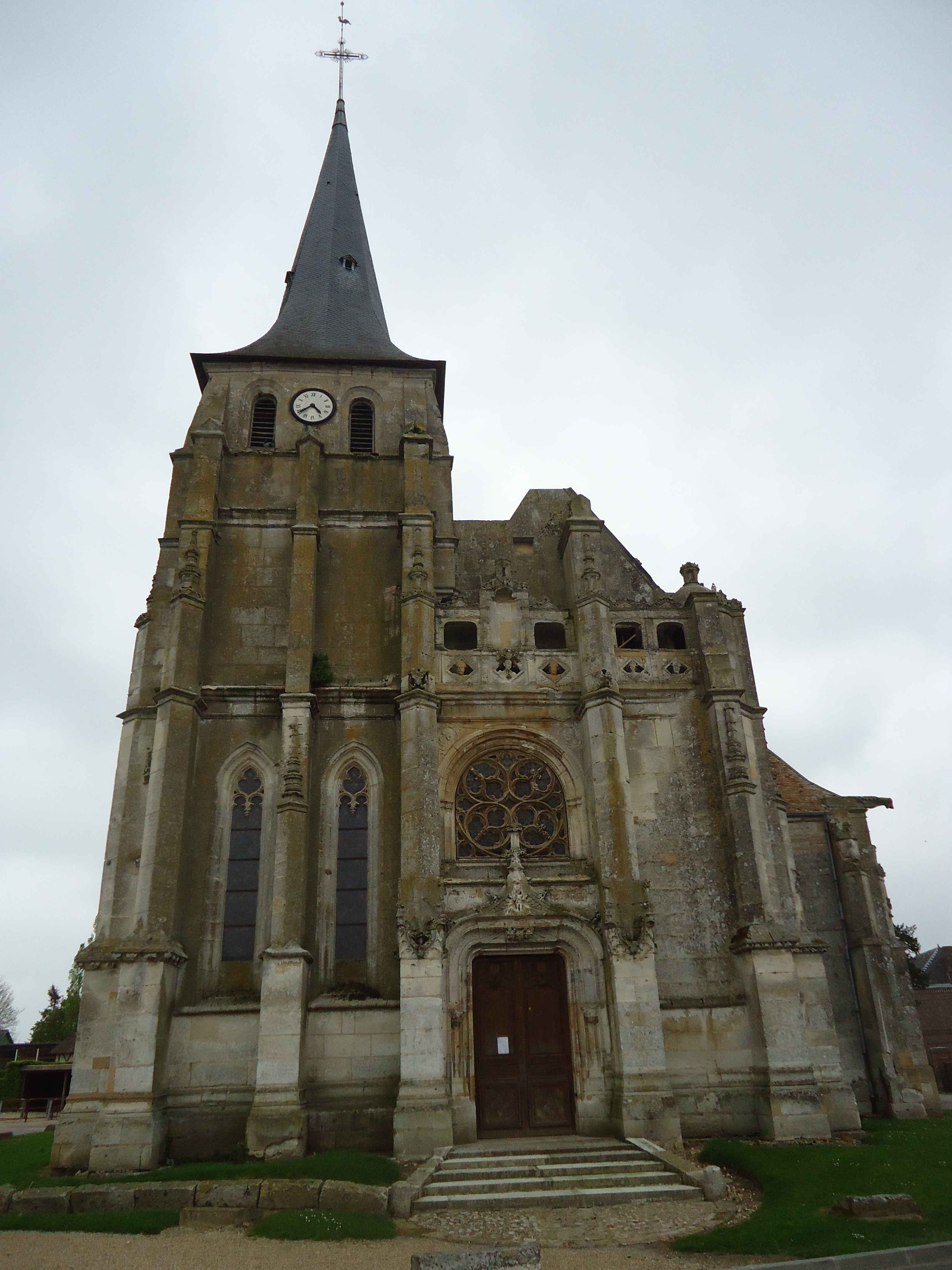 Eglise Saint-Aubin de Saint-Aubin d'Ecrosville (ISMH)